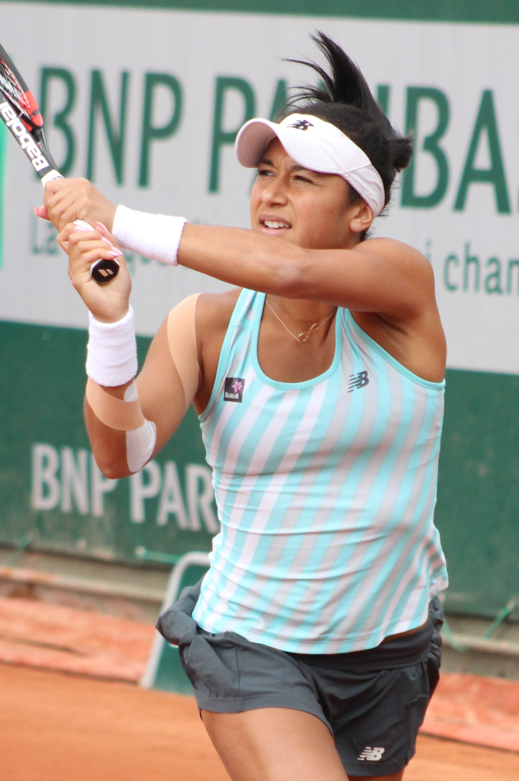 Watson RG15 (2)